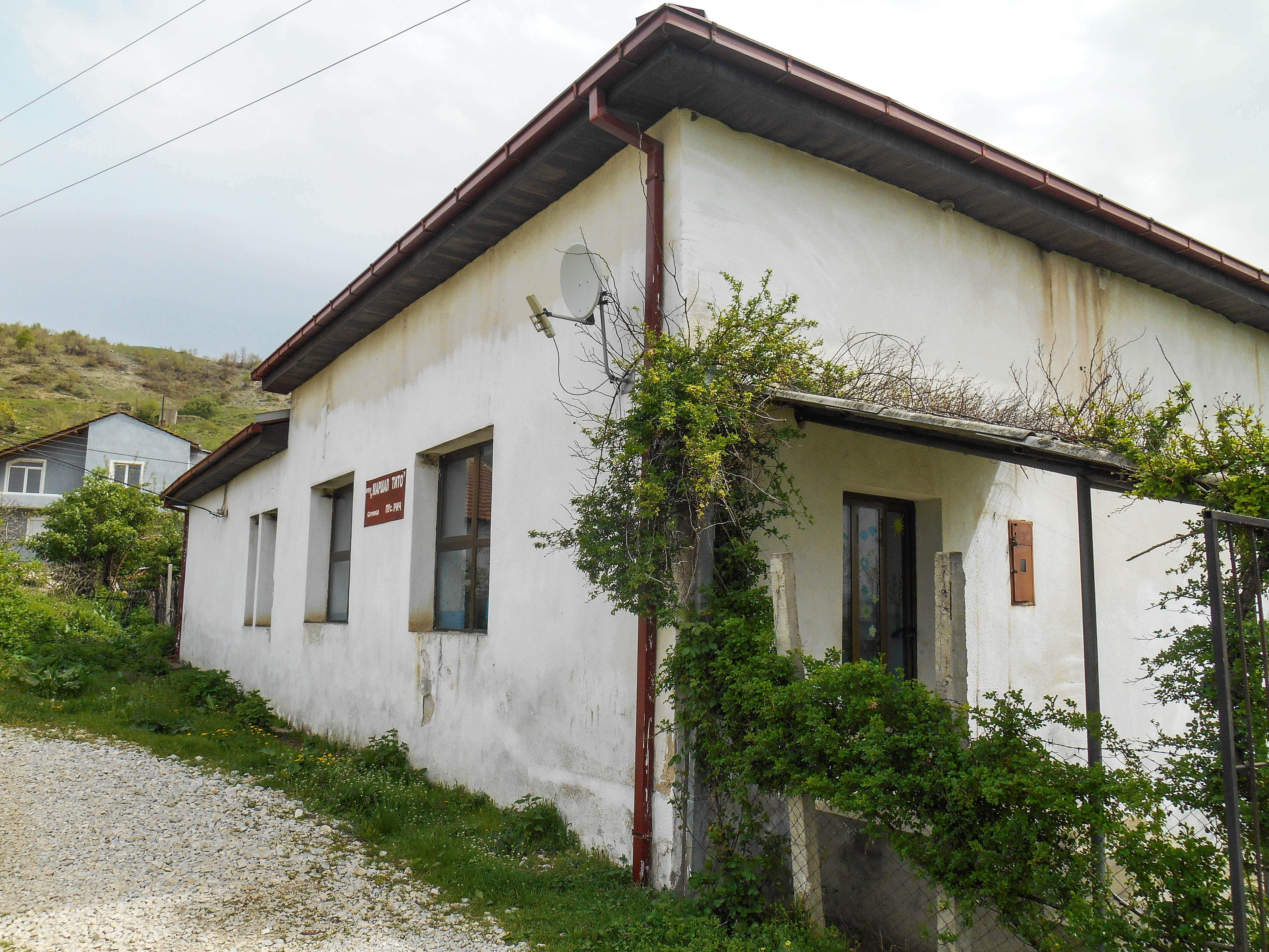 Училиште Маршал Тито